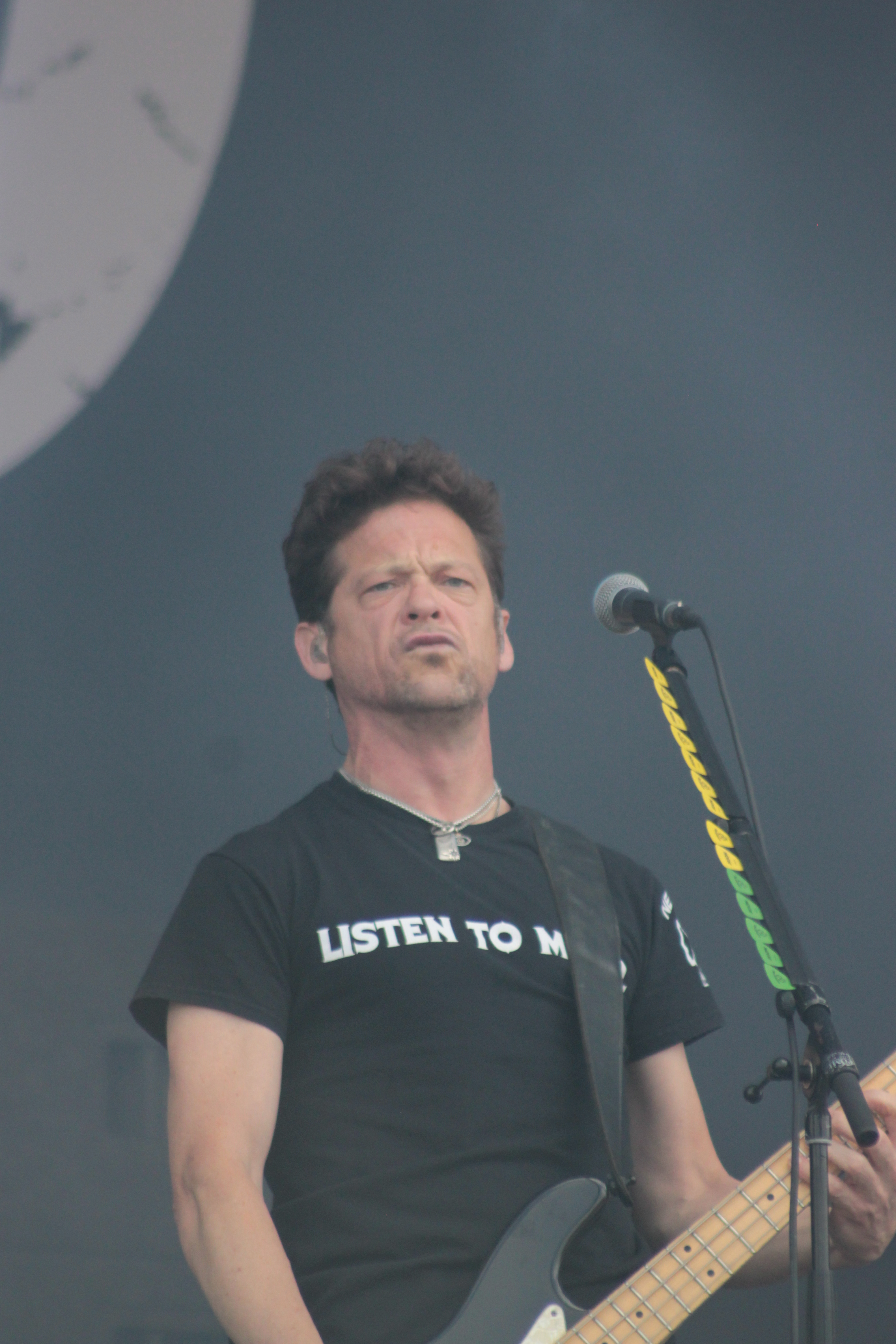 Jason Newsted, Newsted, Hellfest 2013, Fr-44-Clisson.